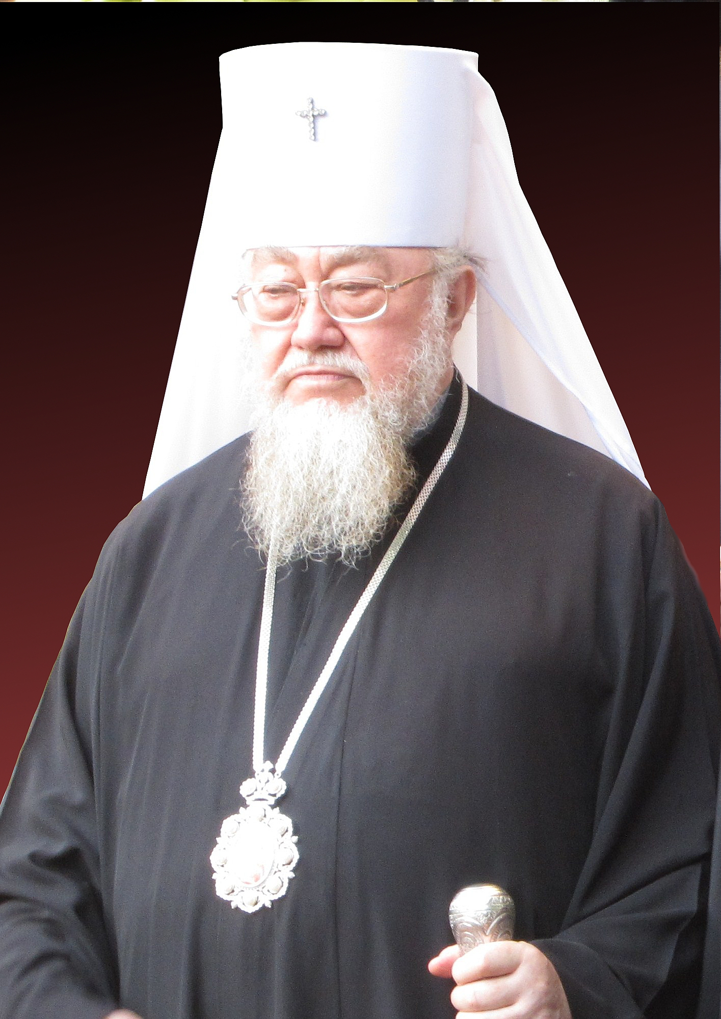 Jego Eminencja Wielce Błogosławiony Sawa metropolita warszawski i całej Polski